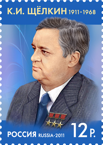 Марка почты России с изображением К.И. Щёлкина (первый научный руководитель и главный конструктор ядерного центра Челябинск-70)